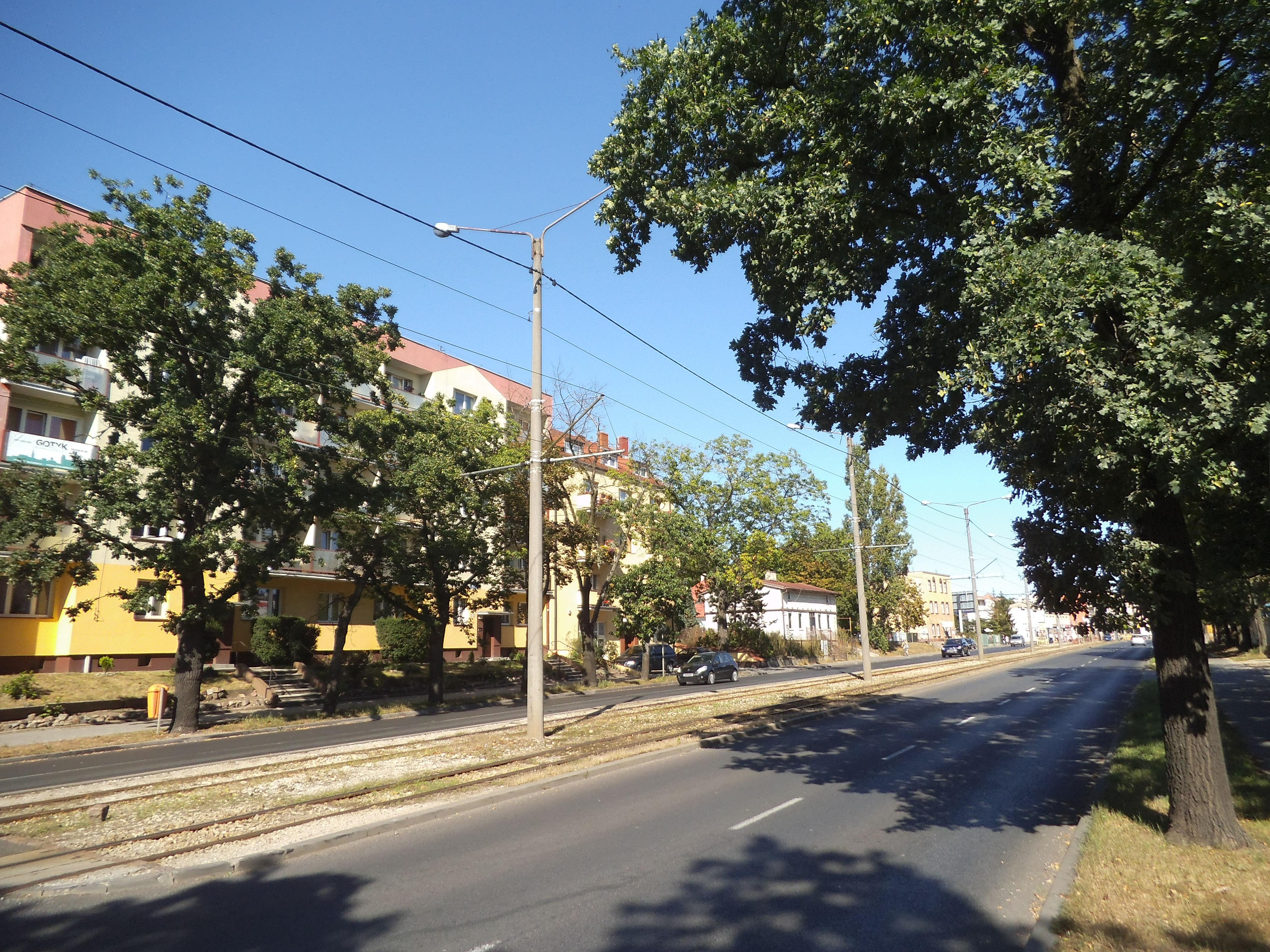 Ulica Lubicka w Toruniu